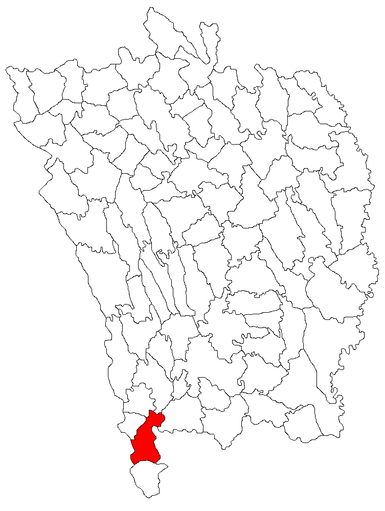 Categorie:Hărţi ale judeţului Vaslui